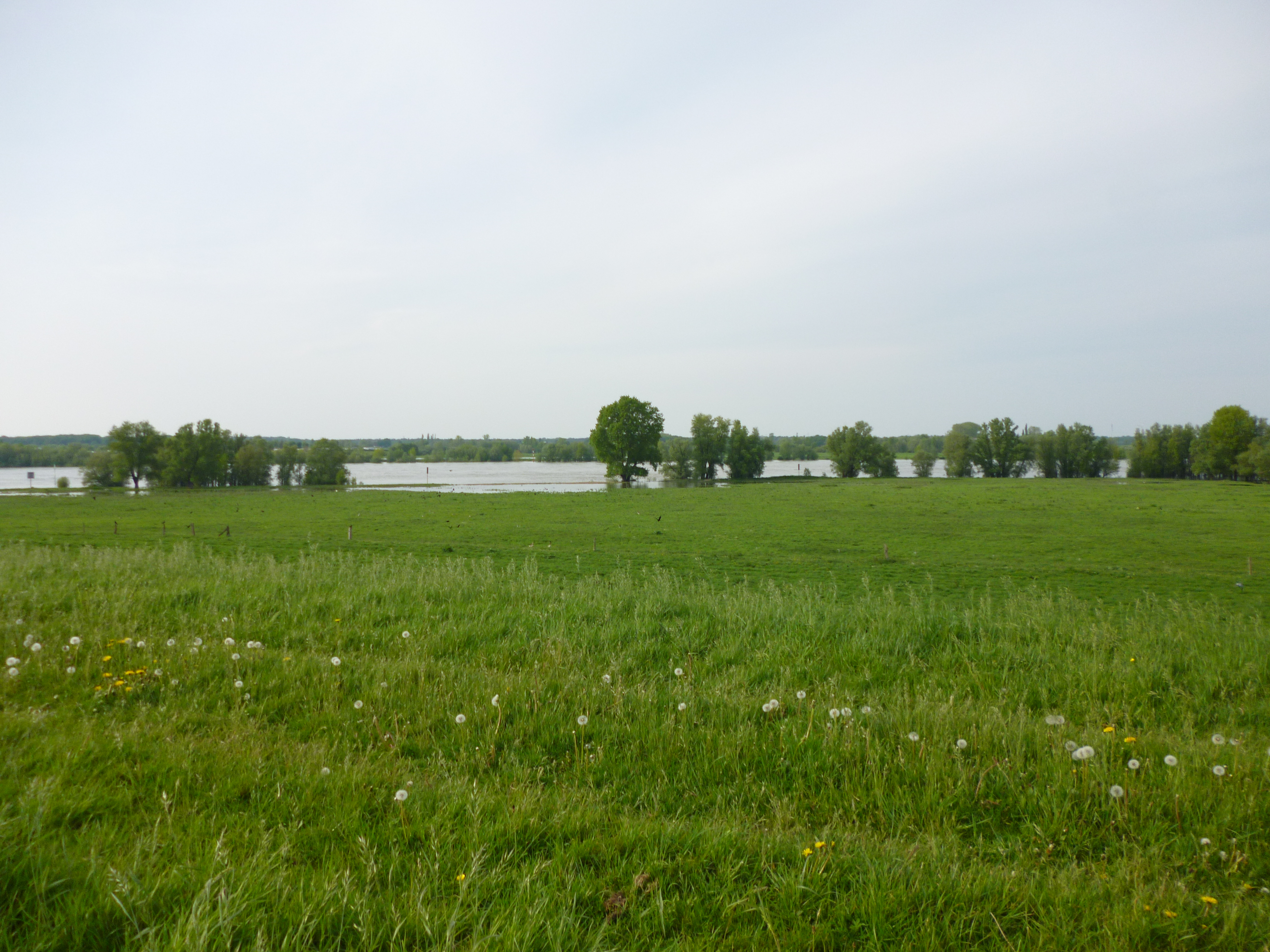 Rheinvorland bei Wesel-Perrich, abgebildeter Bereich im Naturschutzgebiet „Rheinaue zwischen Büderich und Perrich“ (das FFH-Gebiet „Rheinvorland bei Perrich“ liegt rechts außerhalb des Bildes)